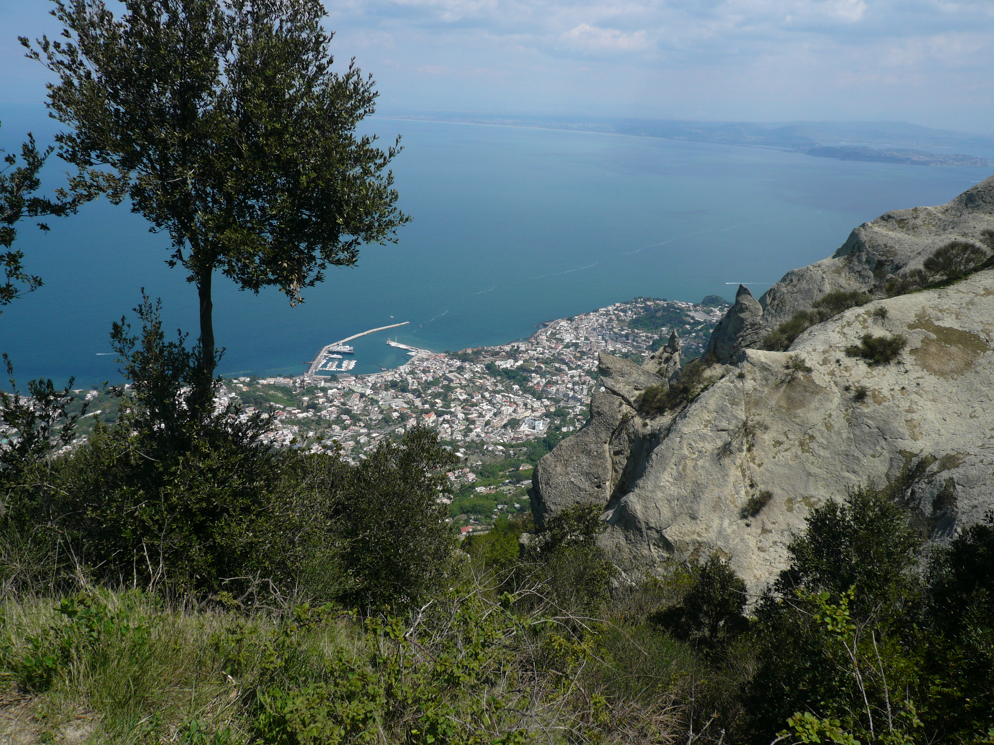 veduta di Casamicciola Terme (isola d'Ischia) dalla vetta del Monte Epomeo. Autore foto: Roberto De Martino